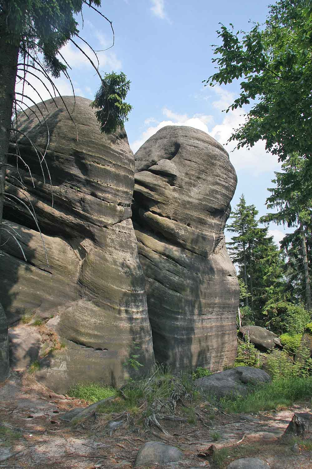 Vyhlídka Supí koš v NPR Broumovské stěny